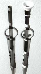 Embouts de sarbacane-Sarbacana (Zen-Dojo-Sarbacana)